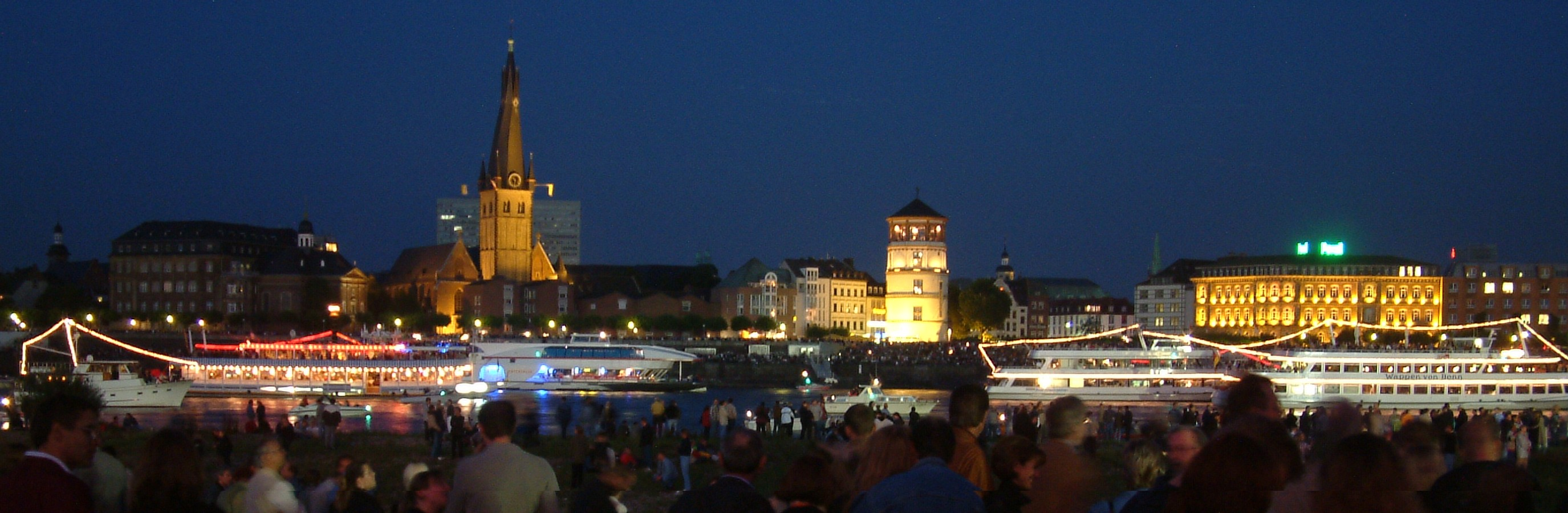 Die Altstadt von Düsseldorf bei Nacht von der linken Rheinseite aus gesehen.